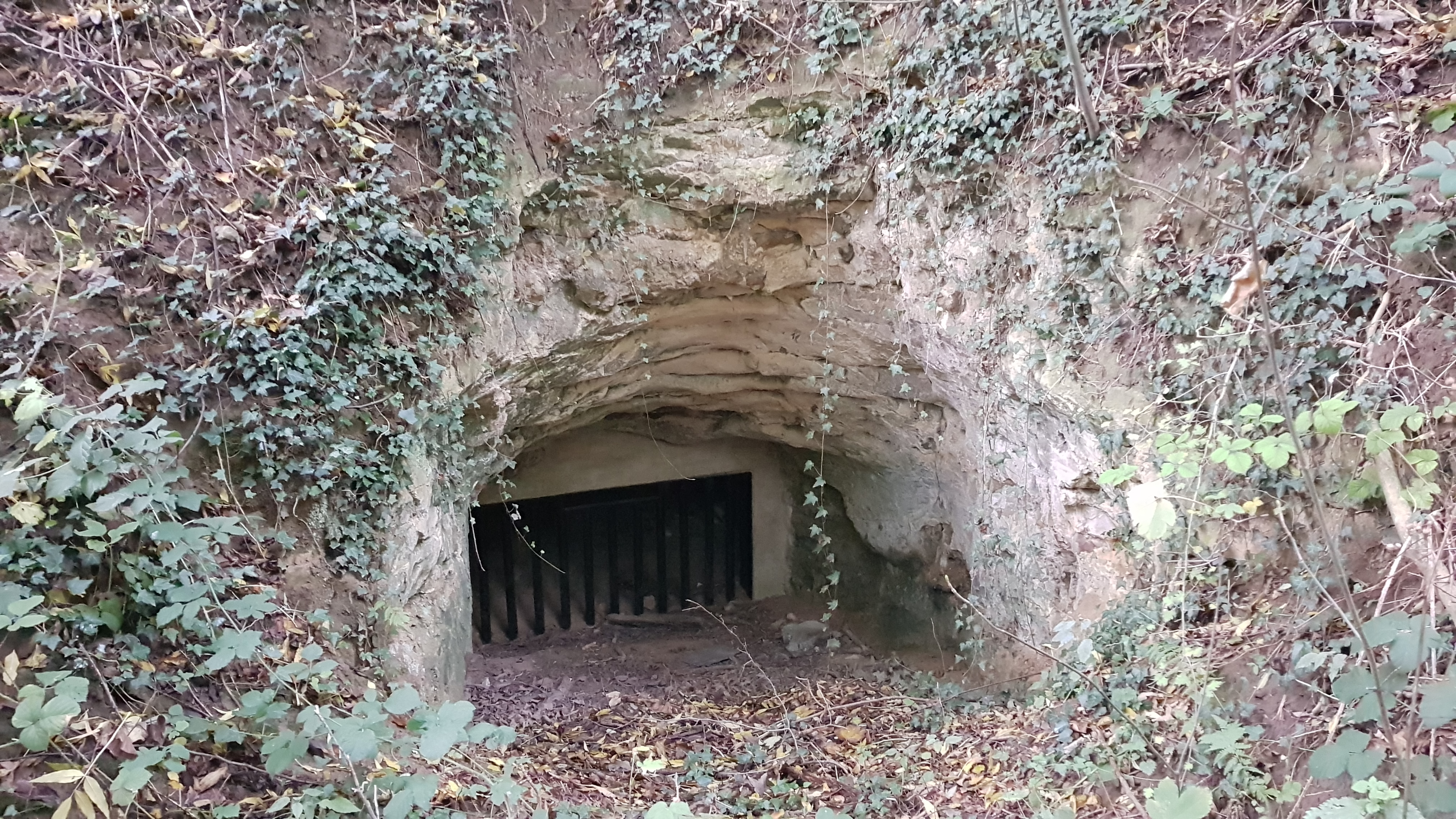 Scheuldergroeve I, Scheulder, Nederland